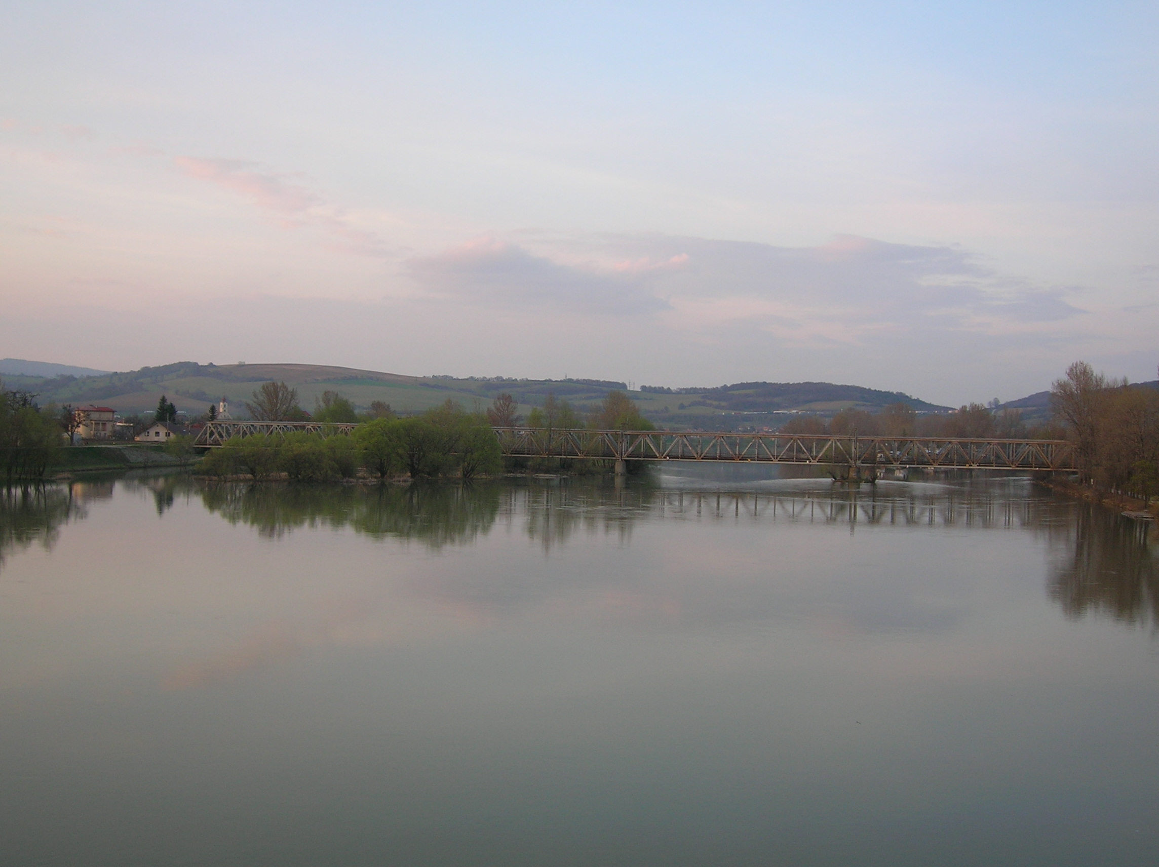 Trenčín, Váh z mosta